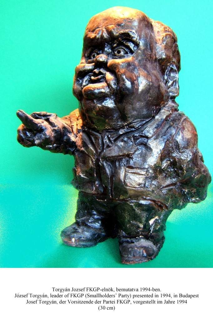 Torgyán József, FKGP-elnök – József Torgyán, Csíky László alkotása (magasság: 30 cm)